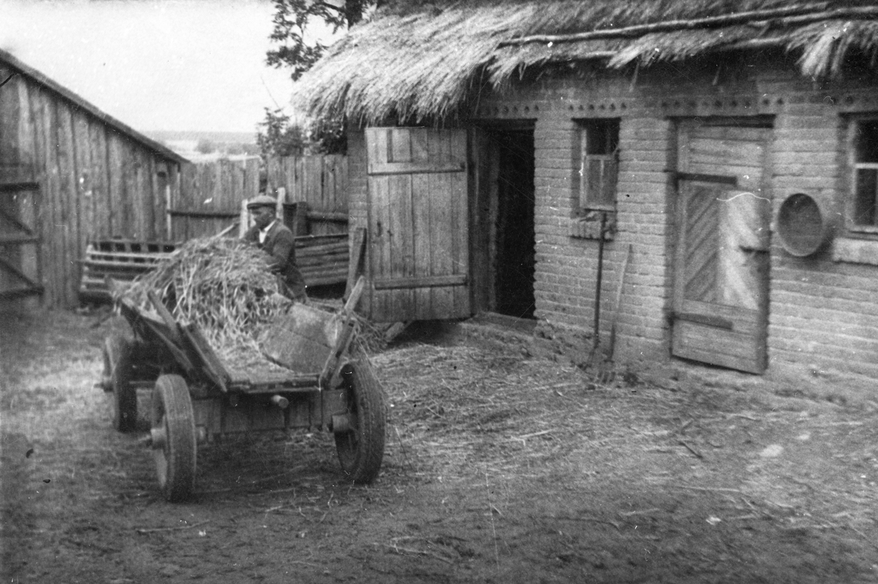 Zwózka siana wozem konnym w powojennej Polsce. Strzałki.